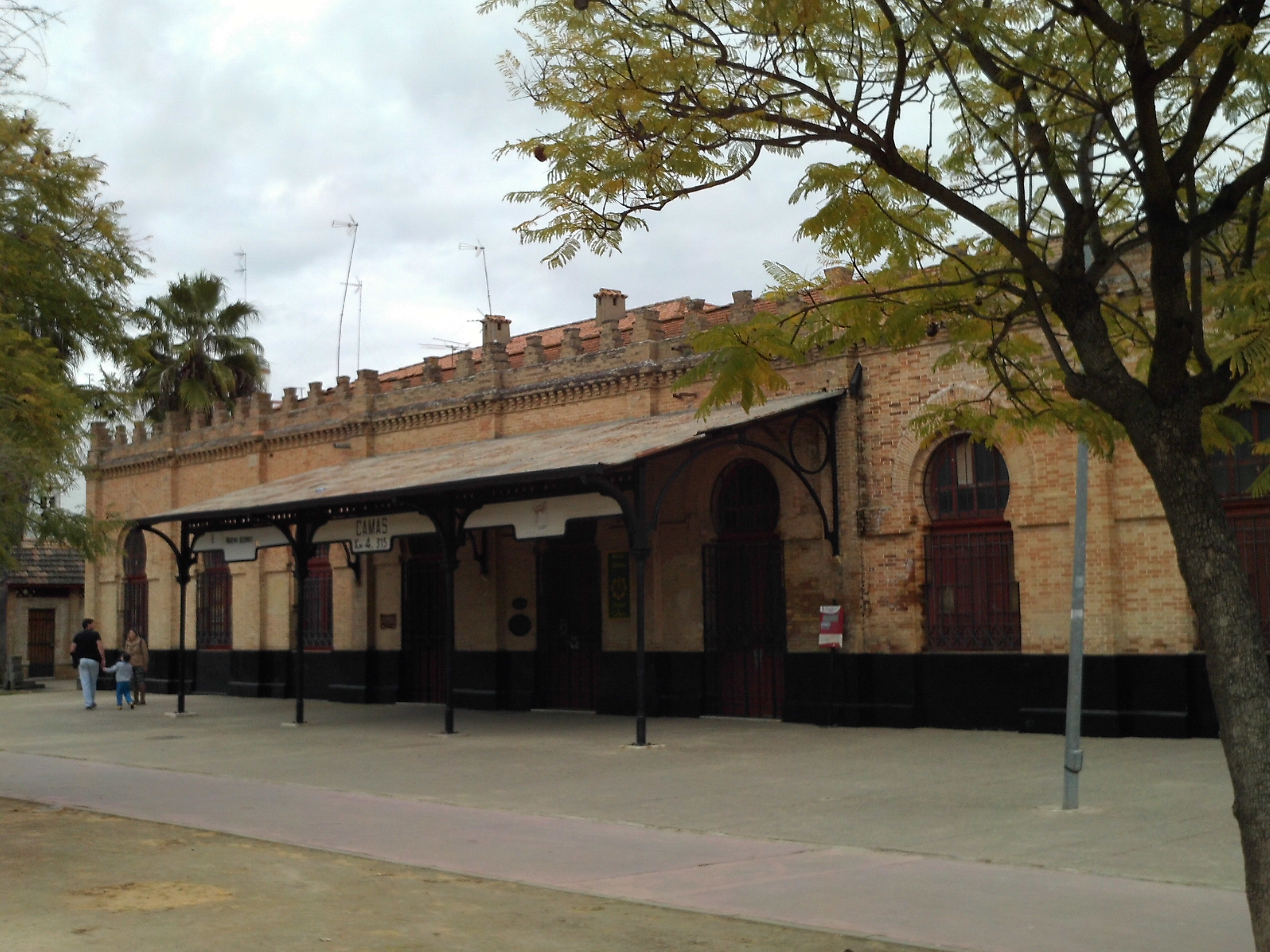 Antigua estación de Camas, provincia de Sevilla, Andalucía, España.